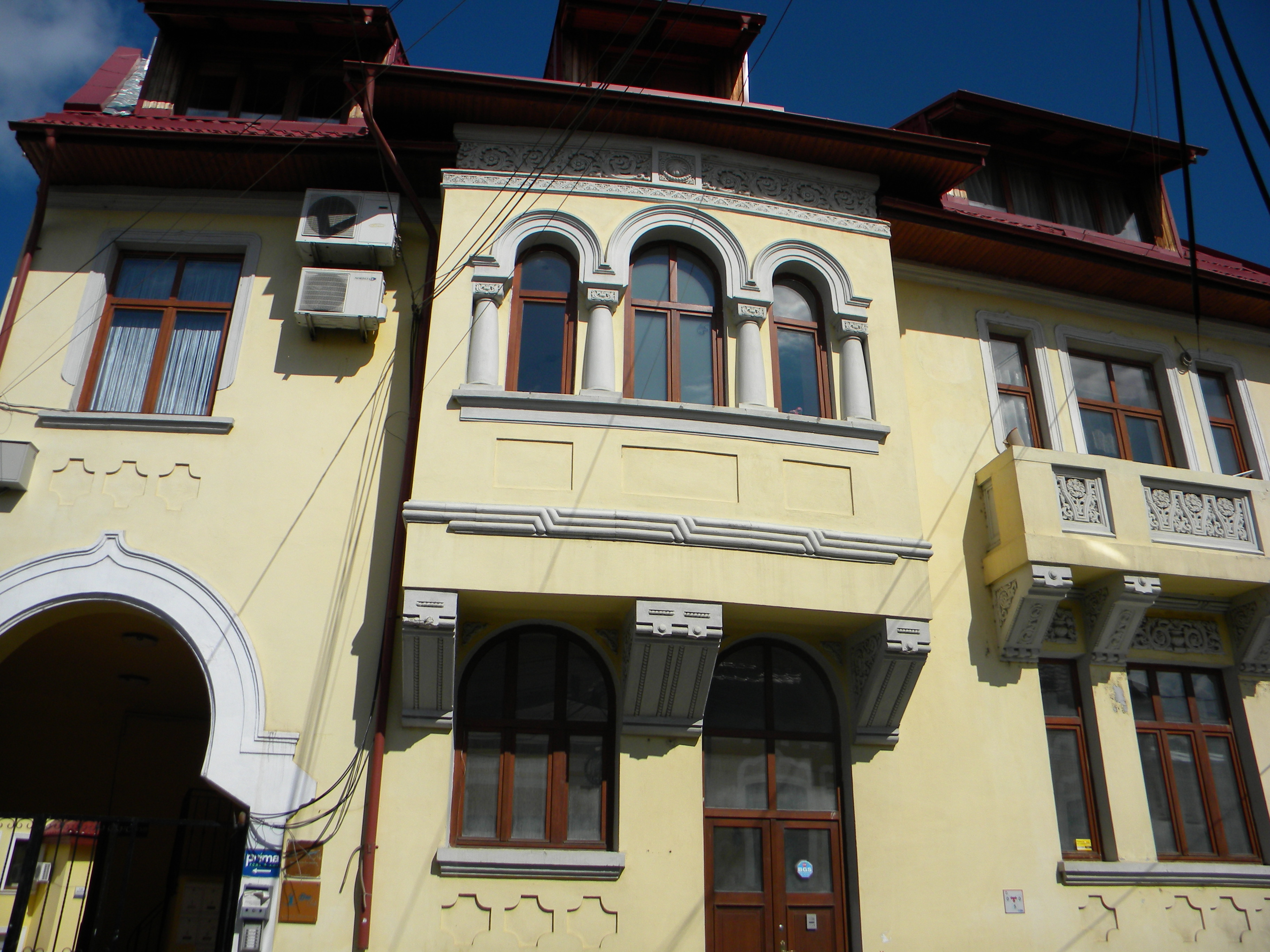 Bucuresti, Romania, Casa pe Str. C.F.Robescu nr. 11, sect. 3